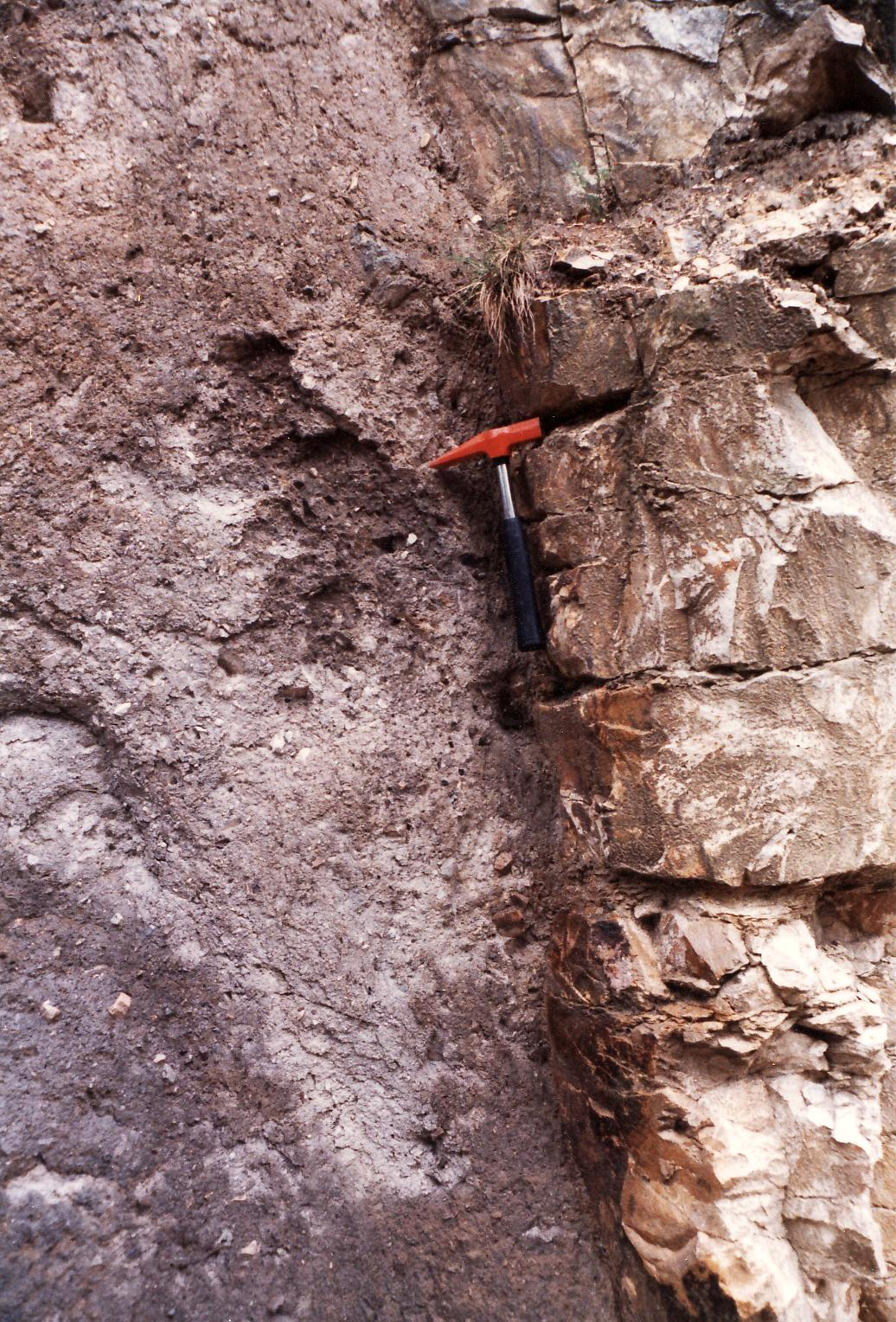 Vulkanschlot des Schwäbischen Vulkans mit Basalttuff-Füllung. Rechts die gebankten Kalke des Weißen Jura Beta.